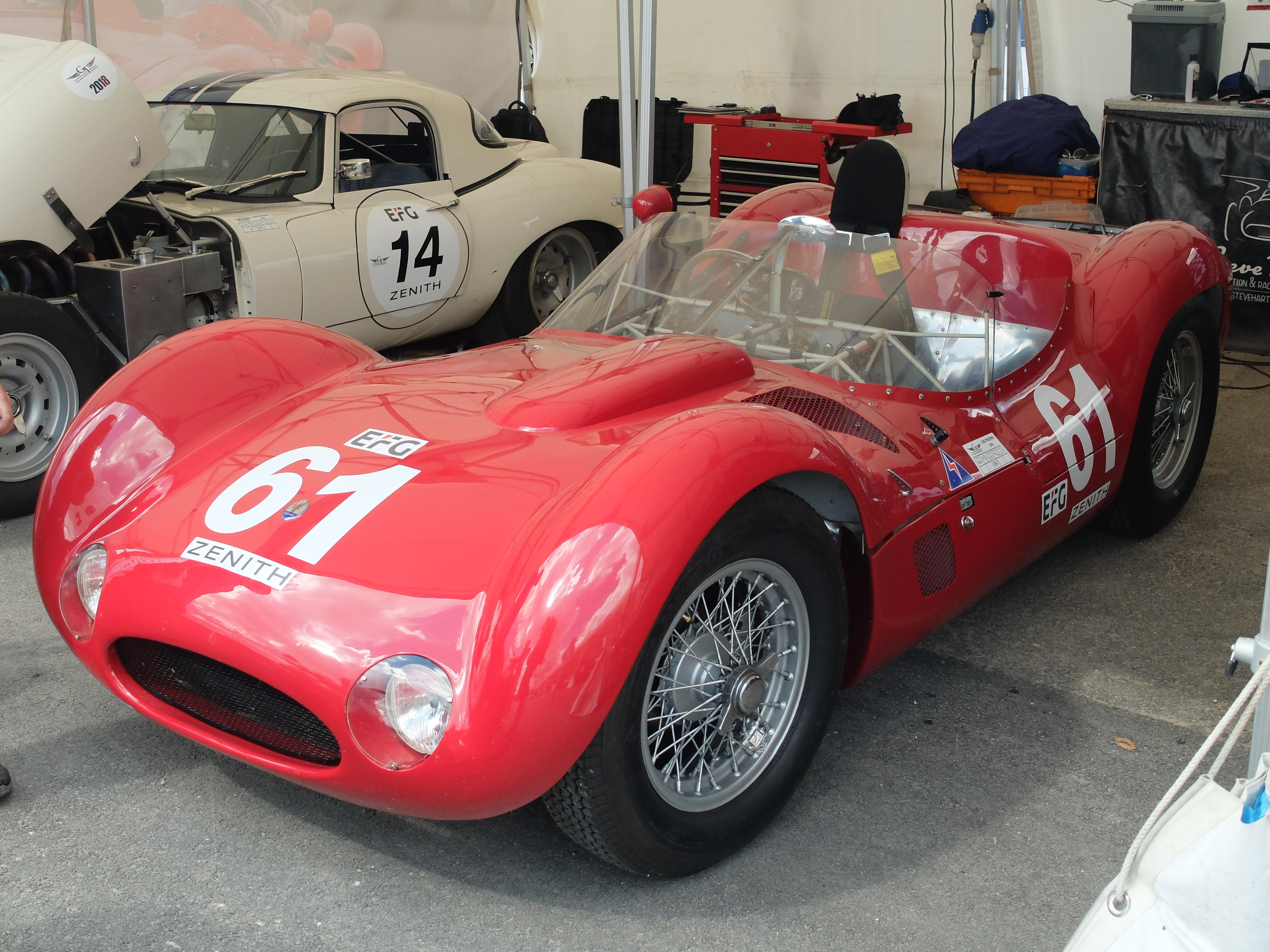 2018 Grand Prix de l’Âge d’Or - Dijon-Prenois - Maserati Tipo 61 "Birdcage", 1960